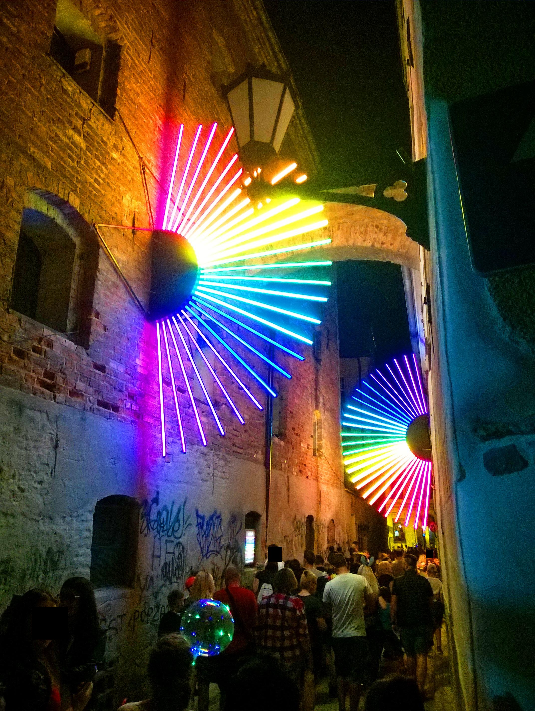 Bella Skyway Festival w2 Toruniu 2019